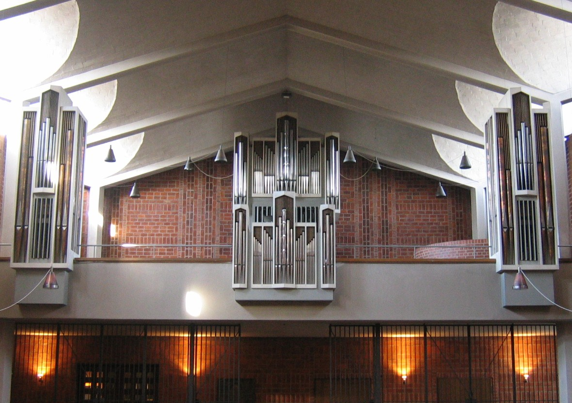 Orgel der Paul-Gerhardt-Kirche in München.